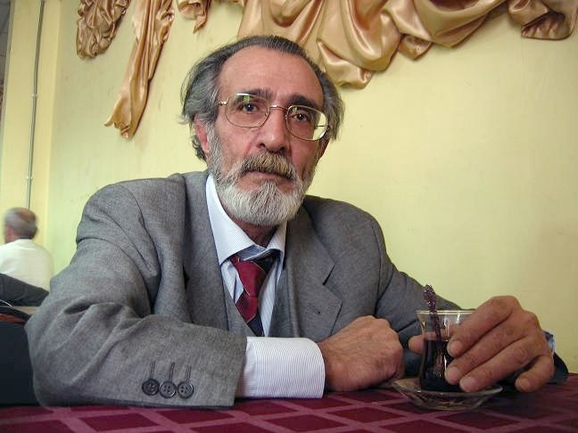 April 2009. Azerbaijan politician Alakram Gummatov (Альакрам Гумматов)